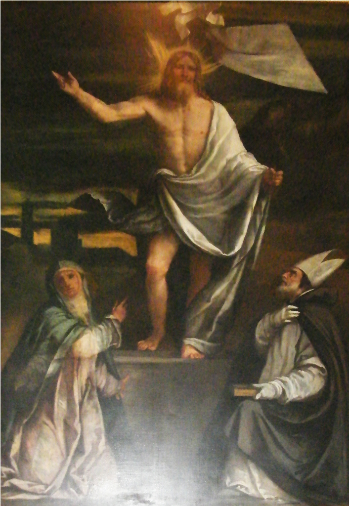 Resurrezione di Cristo tra un vescovo e una religiosa (Romanino) - Chiesa di S. Clemente - Brescia